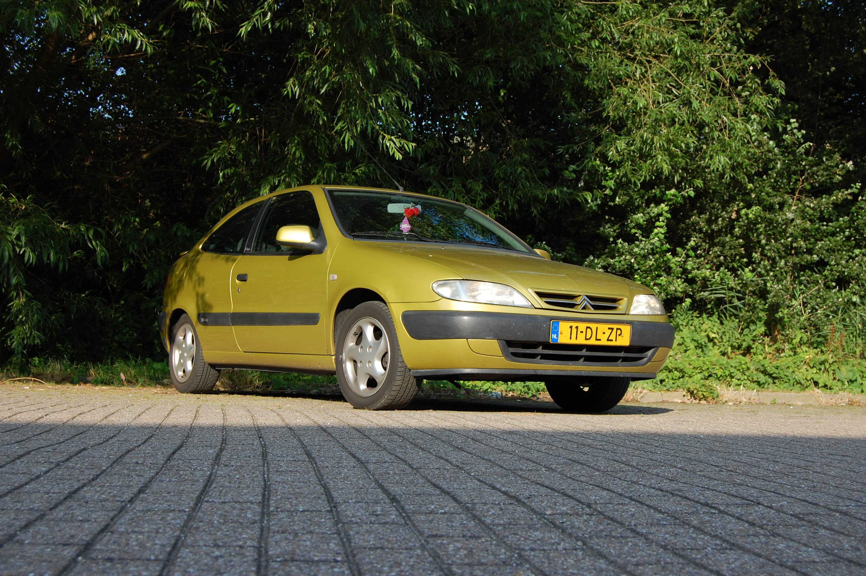 My car